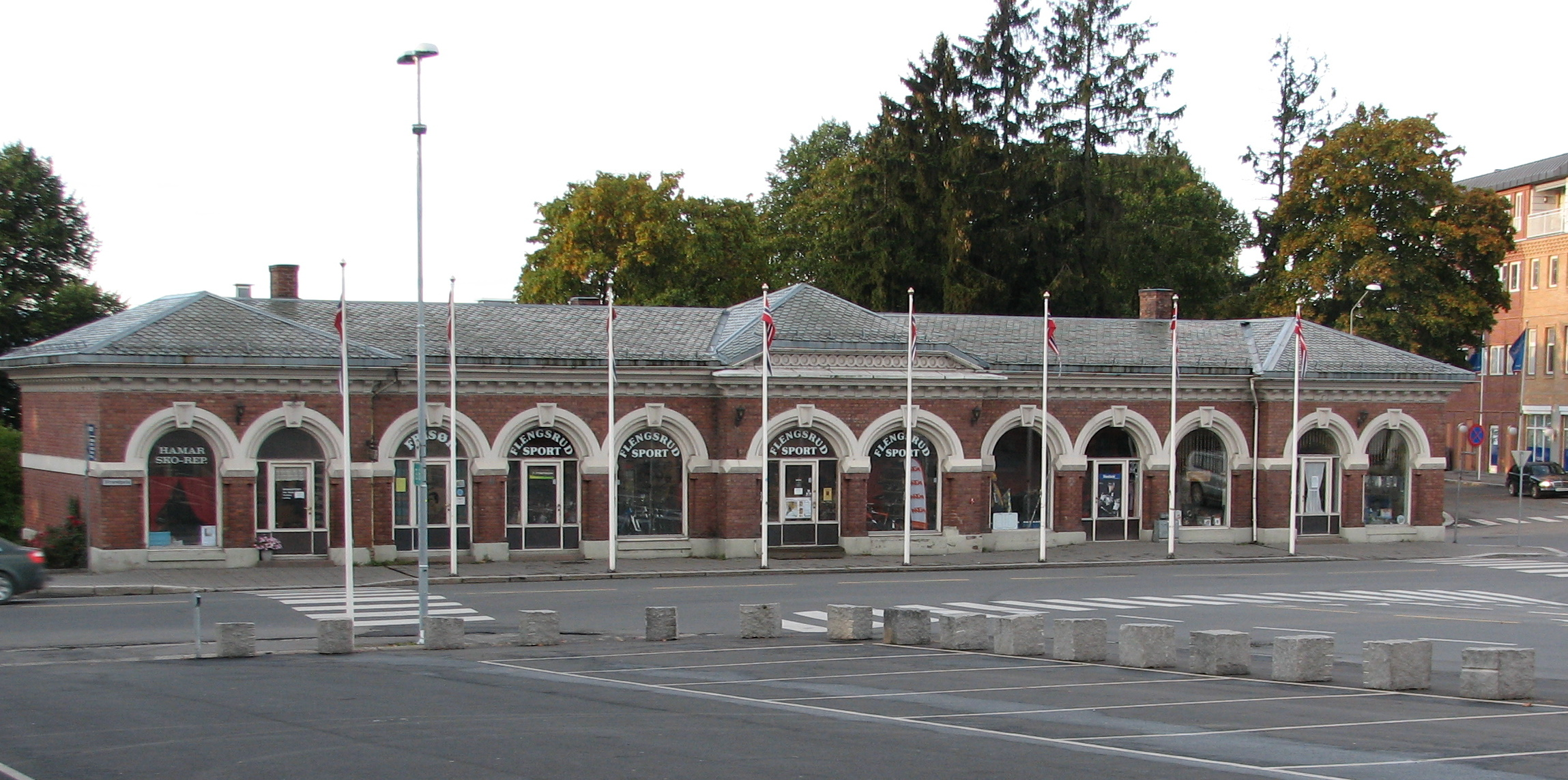 Basarbygningen på Stortorget på Hamar